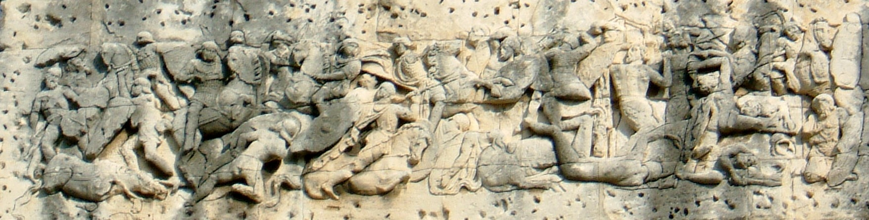 Römischer Triumphbogen in Orange (Südfrankreich). Relief aus der Attika über dem mittleren Torbogen. Südseite